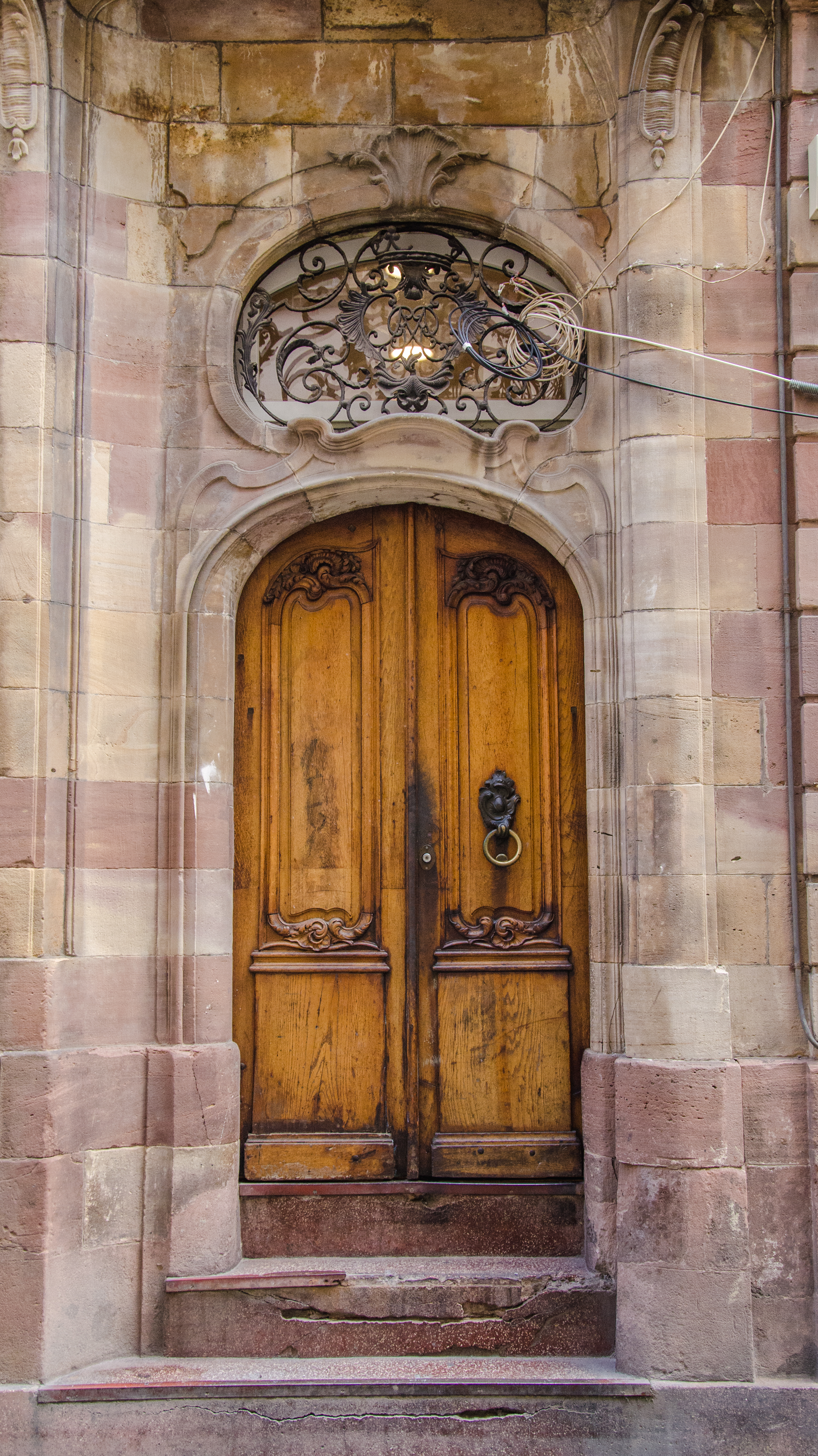 Jolie porte rococo avec une imposte emplie de fer forgé.